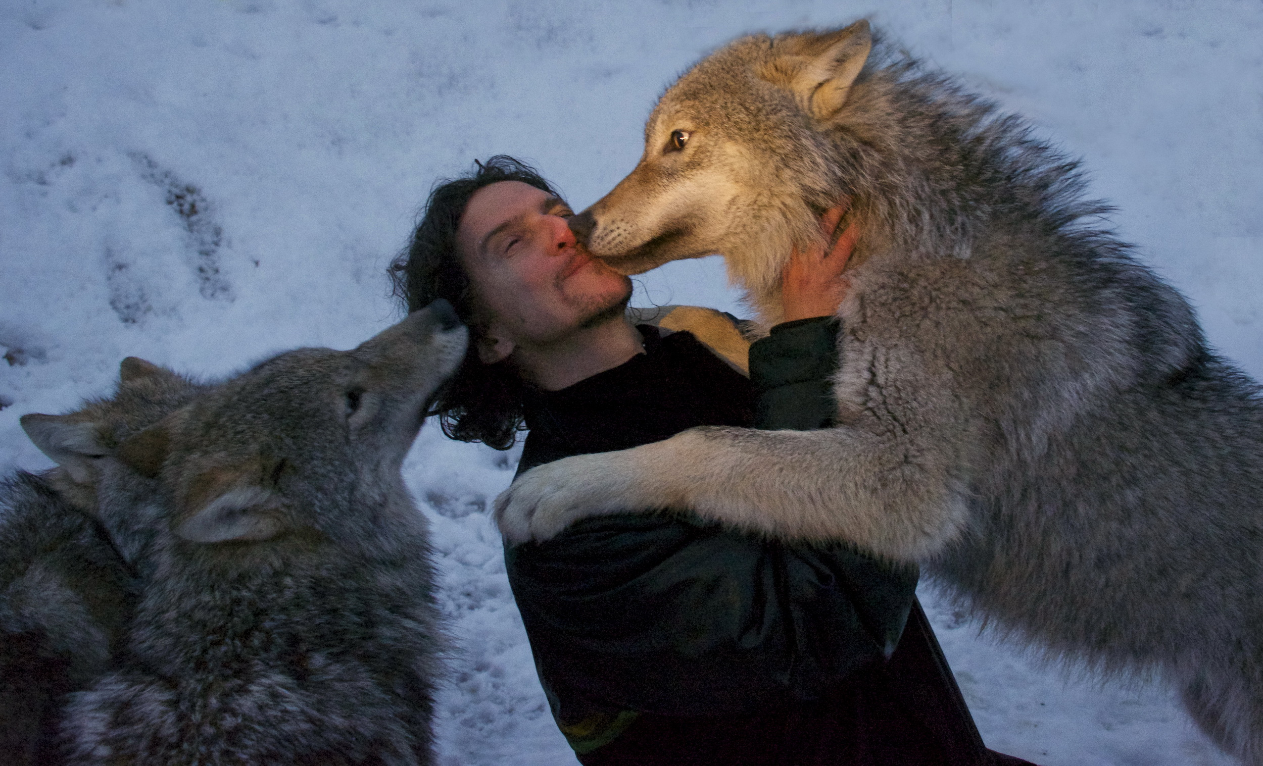 Foto di Luca Bracali